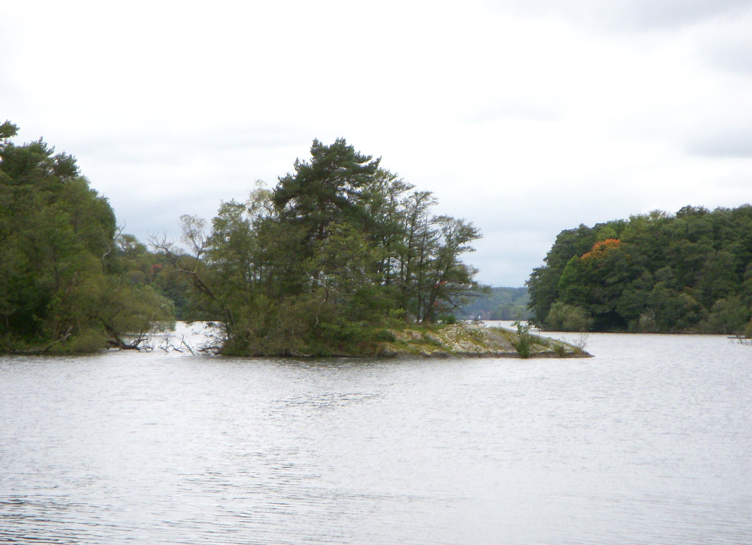 Ön E-holmen i Mälaren